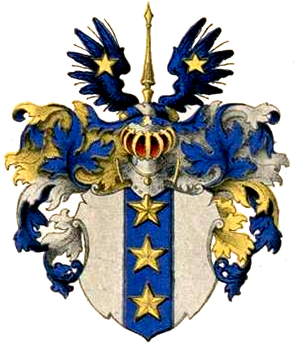 Mandenstierna suguvõsa aadlivapp